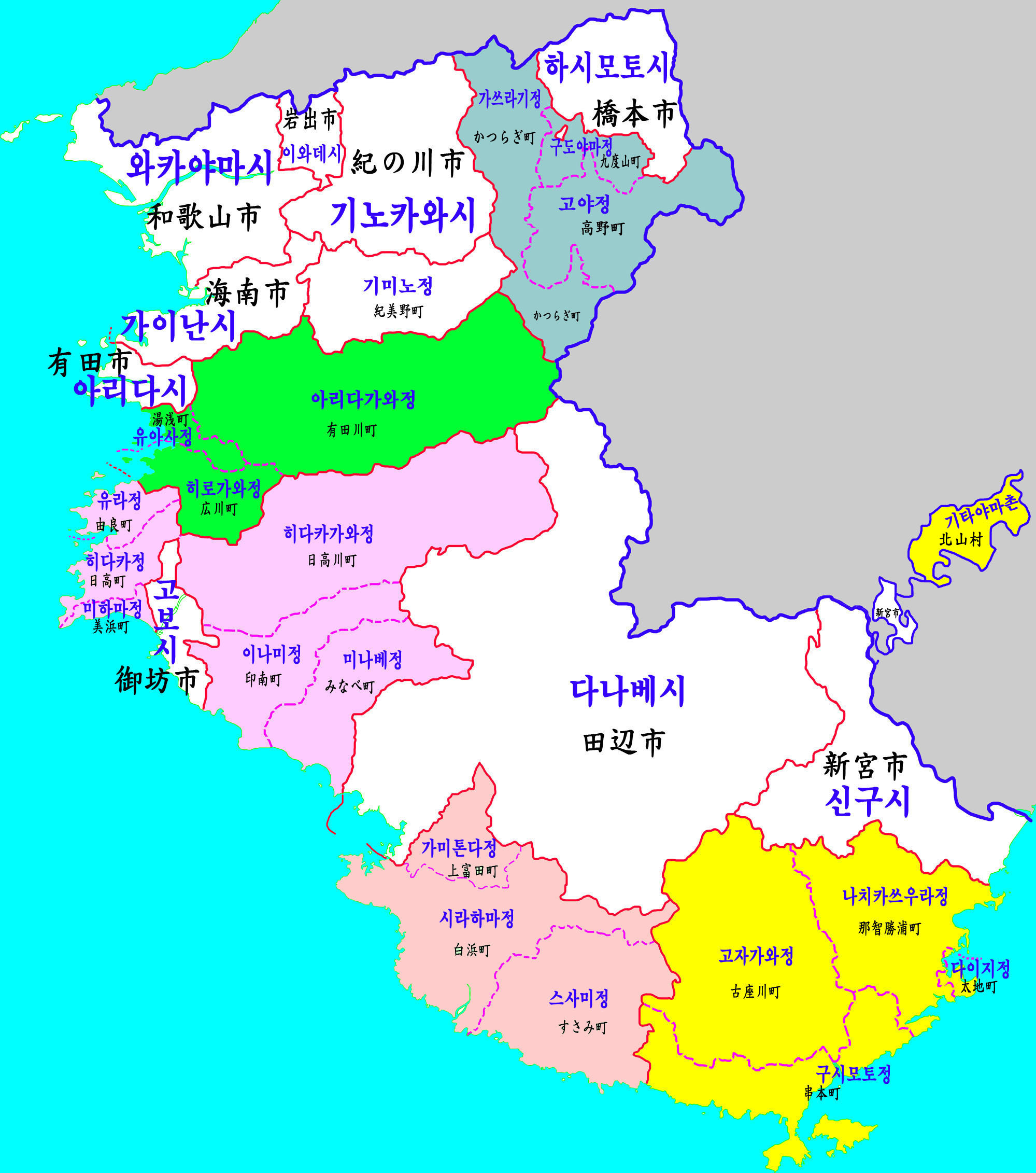 와카야마현 행정구역